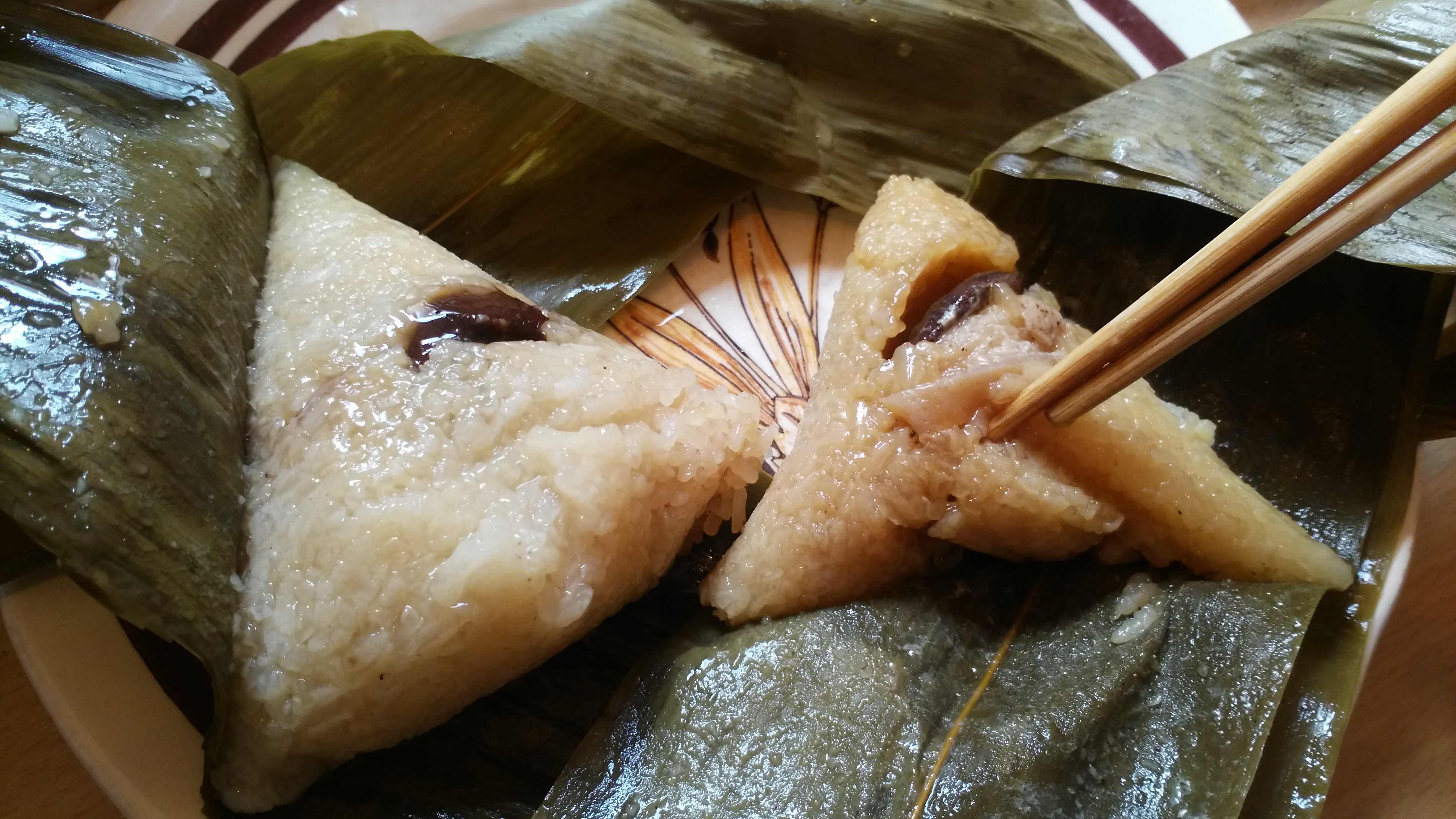 Die Füllungen sind vielfältig.